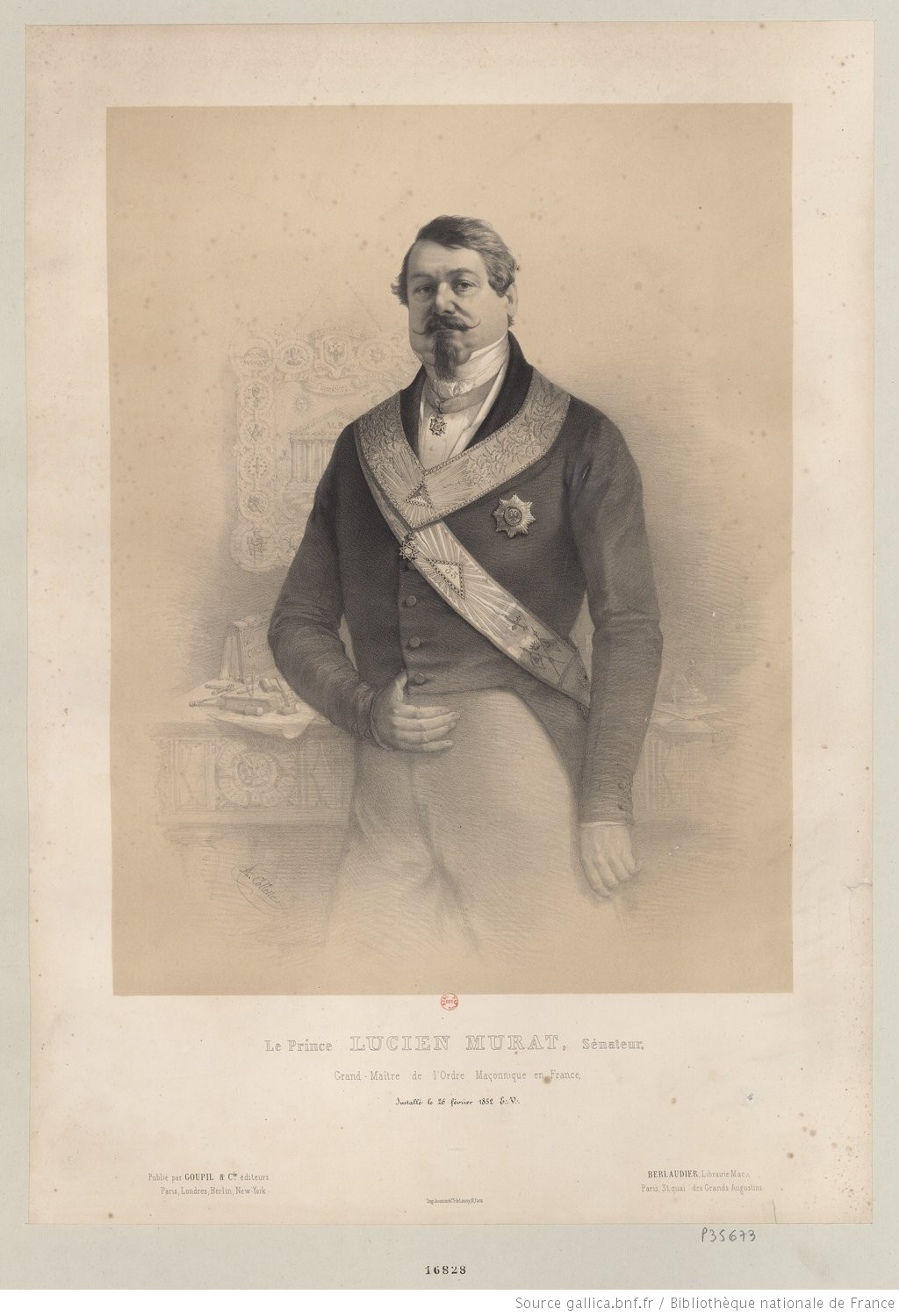 Portrait of Lucien Murat en tenue de Grand Maître